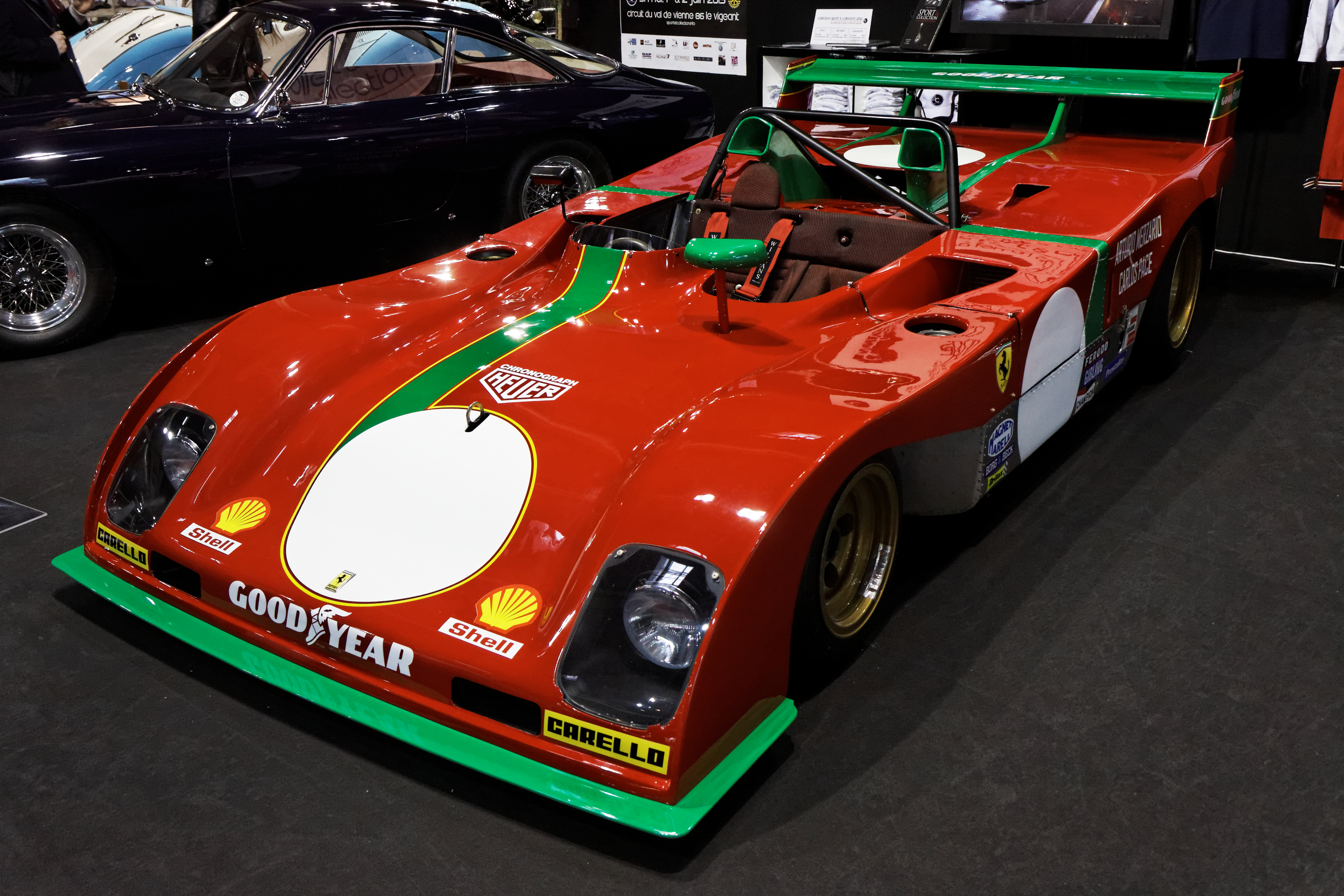 Une Ferrari 312 PB présentée lors du salon Retromobile 2013.